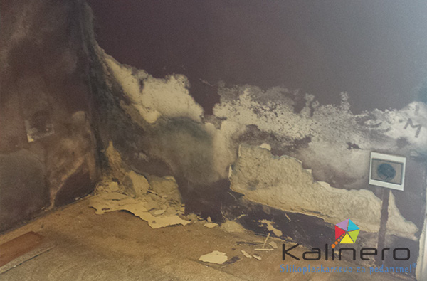 Posledice odpadanja ometa zaradi kapilarne vlage.